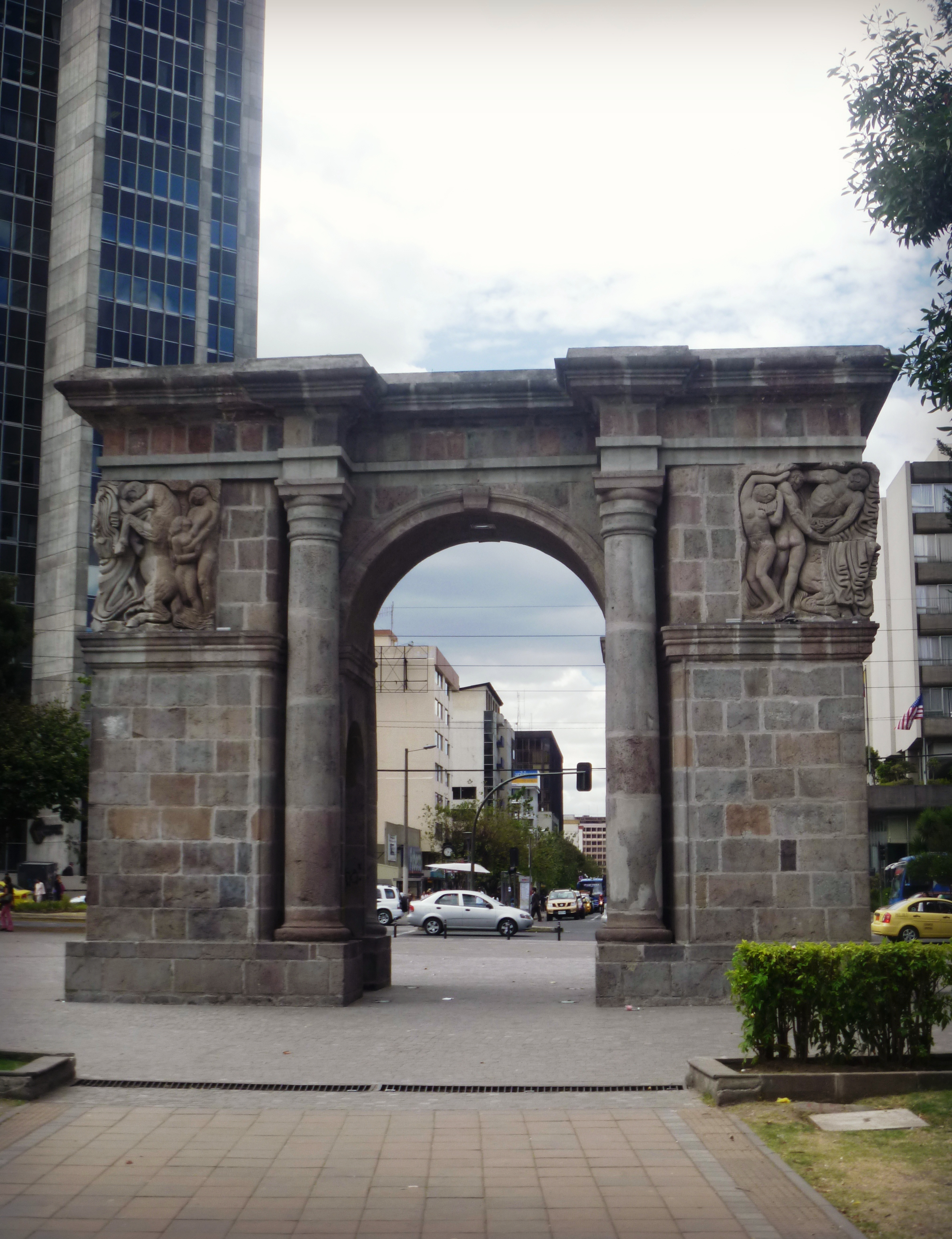 Monumento "Puerta de La Circasiana", en el parque El Ejido de Quito.